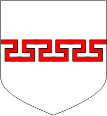 « D’argent à une cotice en fasce de gueules, potencée et contre-potencée